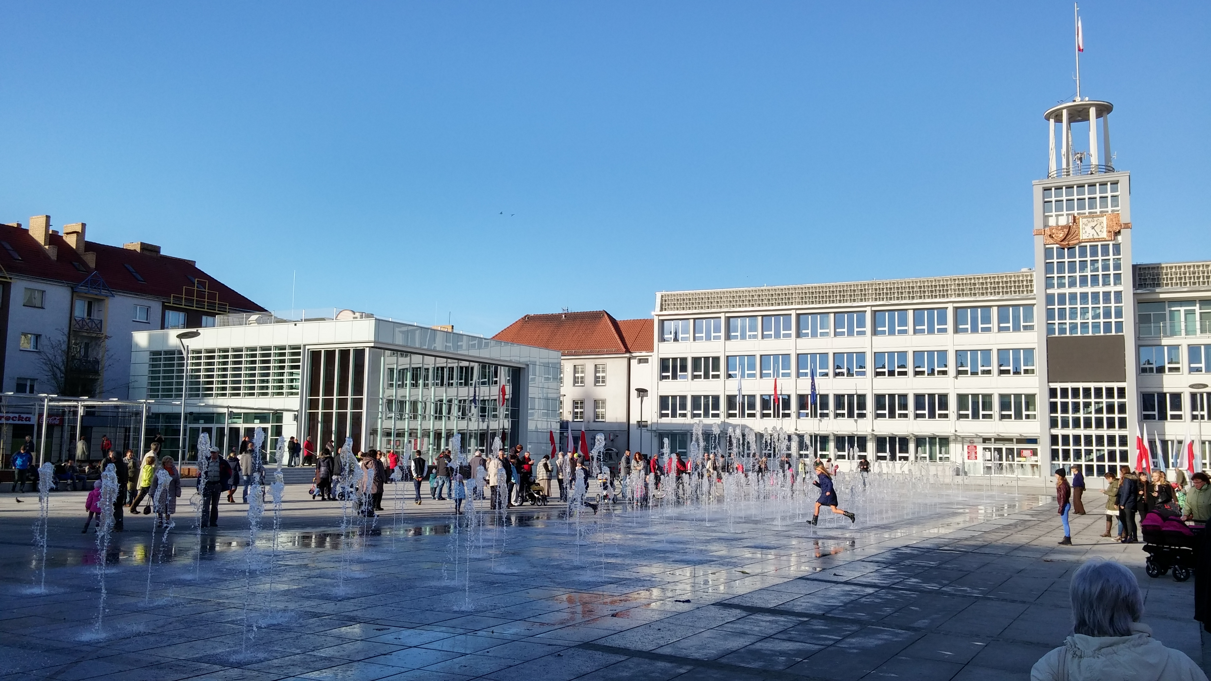 Koszaliński Rynek Staromiejski po rewitalizacji w 2014 roku